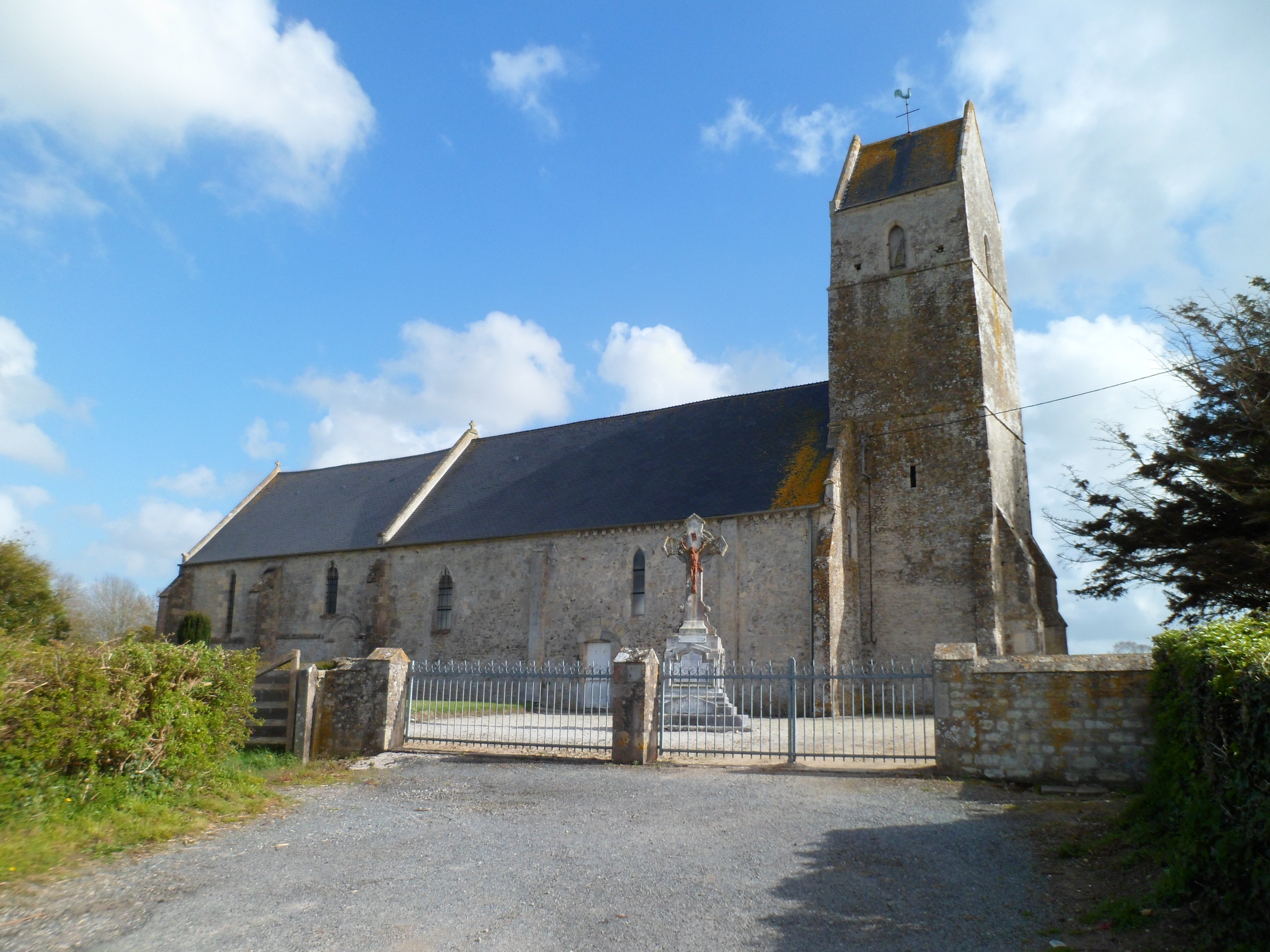 église Sainte-Honorine d'Audouville-la-Hubert